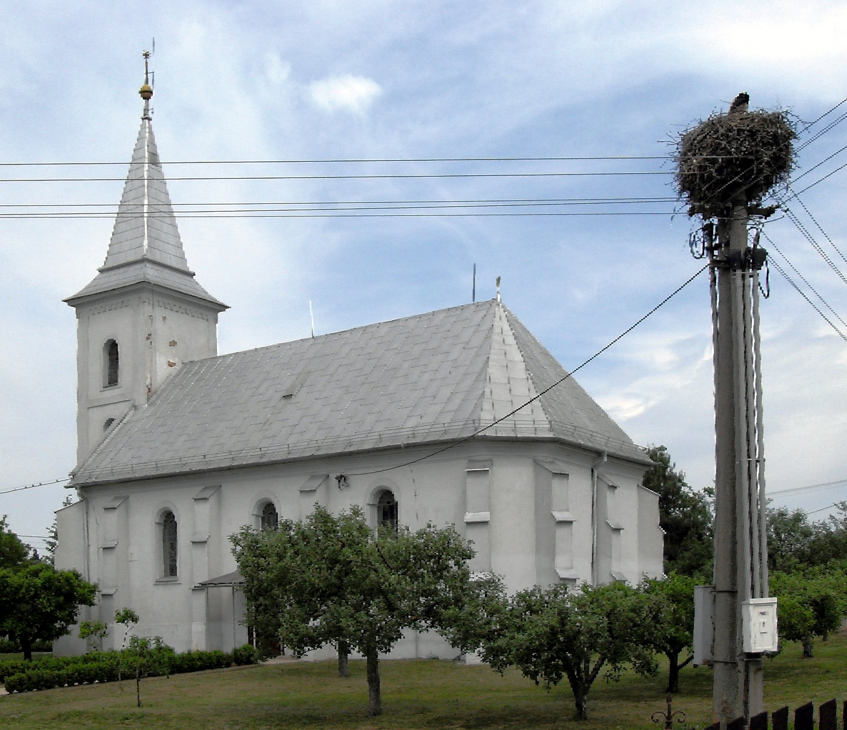 Cestice, evanjelický kostol